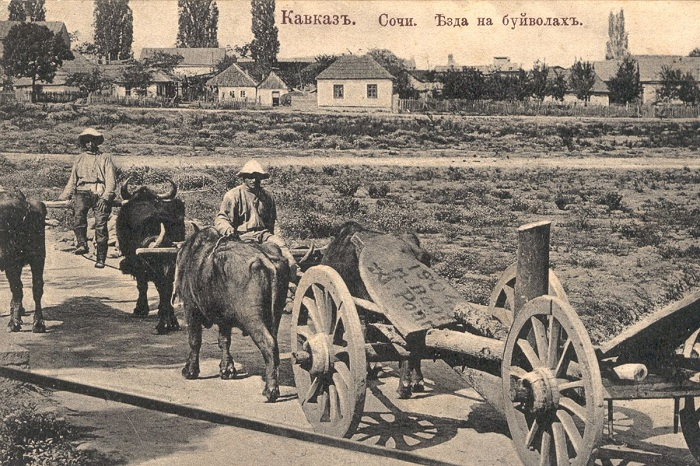 Перевозка якоря из Якорной щели в Сочи на буйволах для монумента" Якорь и пушка"